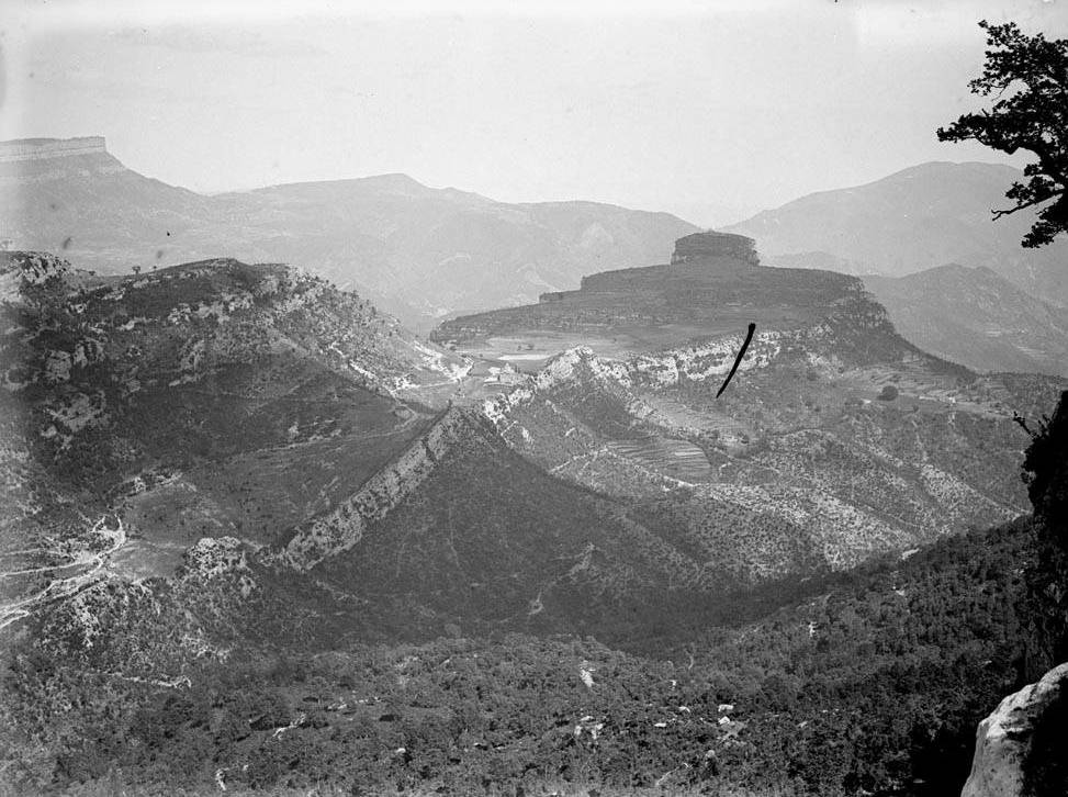 Vista de muntanyes. Enric Ribas i Virgili (Entre 1920 i 1930)